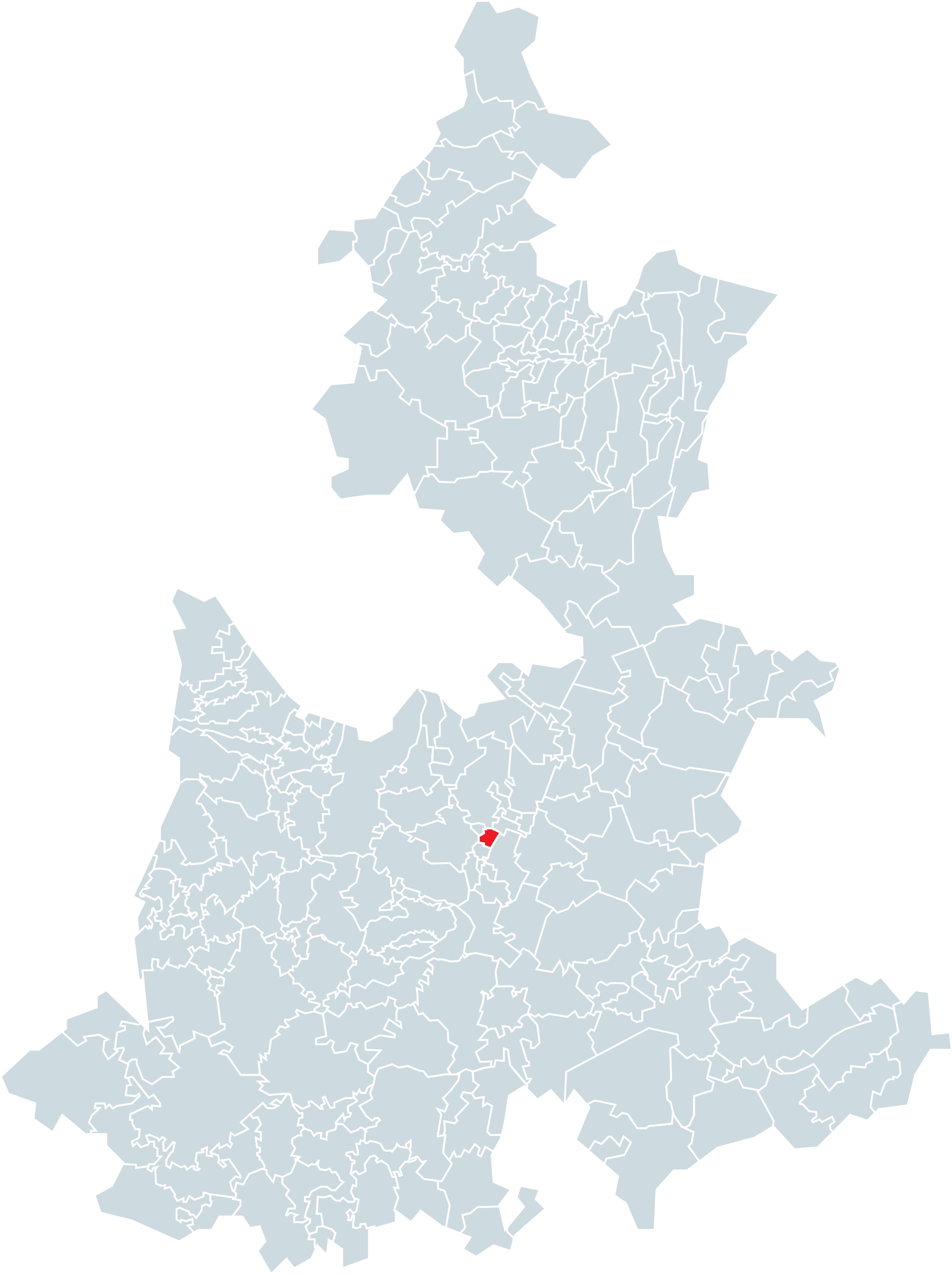 Municipio de Santo Tomás Hueyotlipan